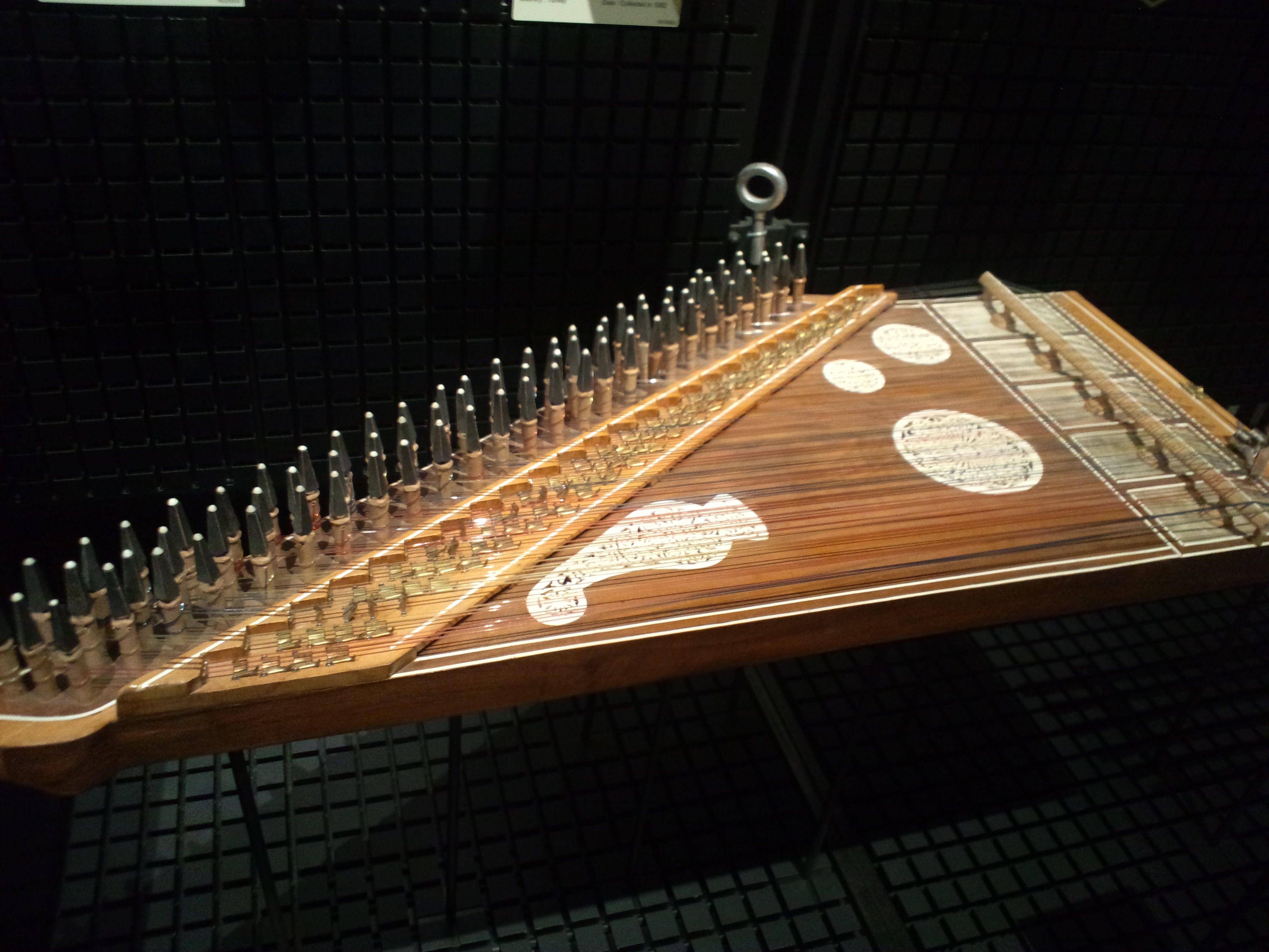 国立民族学博物館（大阪） カーヌーン（エジプト、カイロ、1990年代制作）